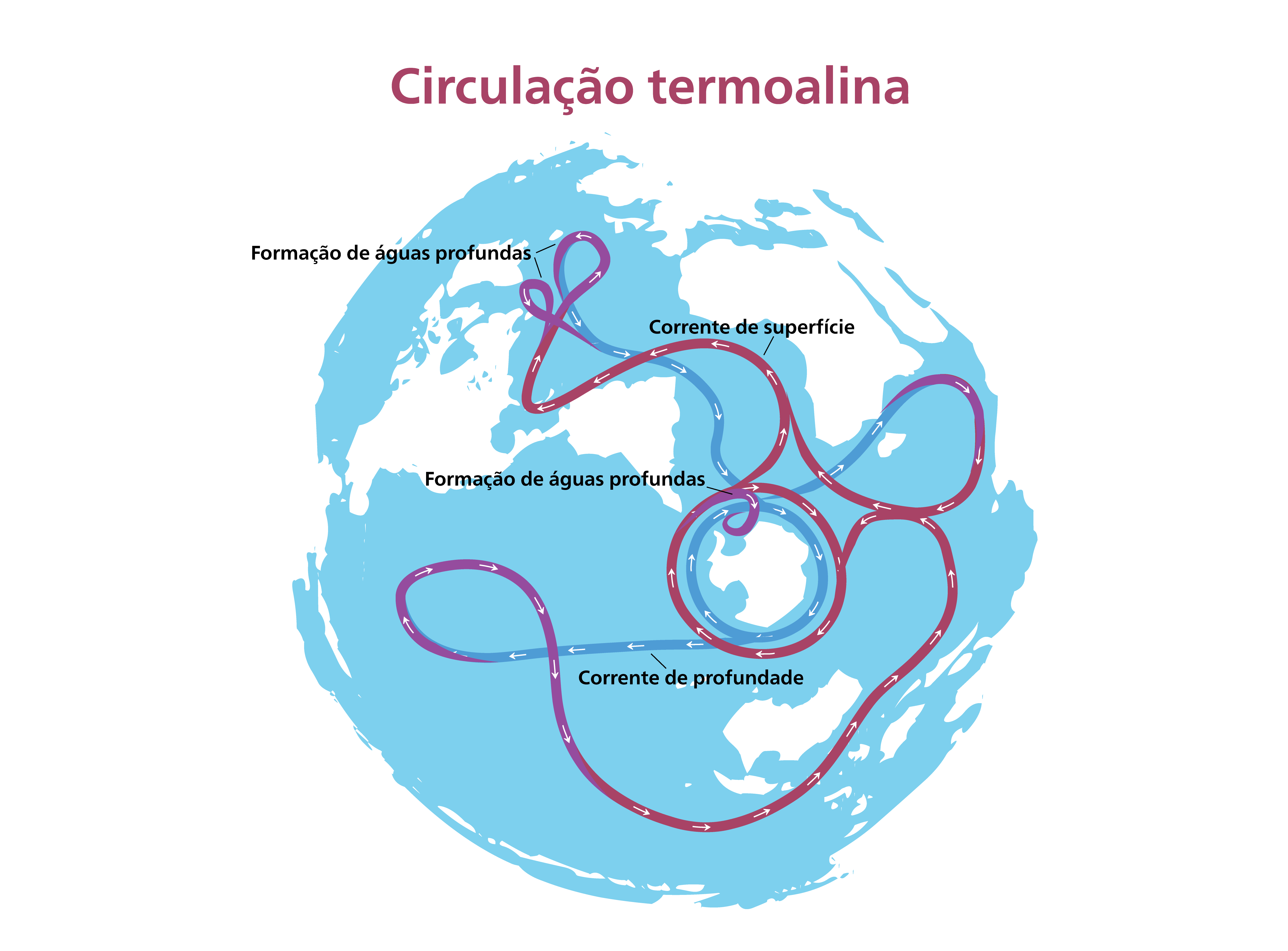 Mapa global da circulação termoalina em oceano contínuo.